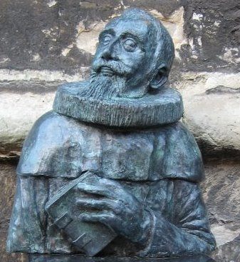 Samuel Ampzing (2006) by Eric J. Coolen. [1] Inscription: Samuel Ampzing 1590-1632 Samuel Ampzing (dominee/schrijver/dichter/taalpurist) wordt vanwege Beschrijvinge ende lof der Stad Haerlem Als Haarlems eerste echte geschiedschrijver beschouwd. Het Ampzingbeeld is een initiatief van het Ampzing Genootschap, mogelijk gemaakt door Jan Rosekrans. Het beeld is vervaardigd door Eric J. Coolen. Haarlem 6 November 2006